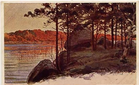 Бенуа, Альберт Николаевич (1852-1936) Уголок Финляндии